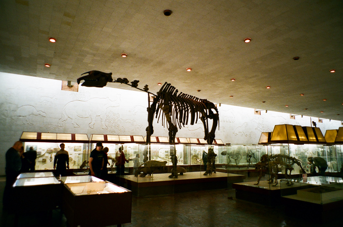 Moscow Paleontological Museum